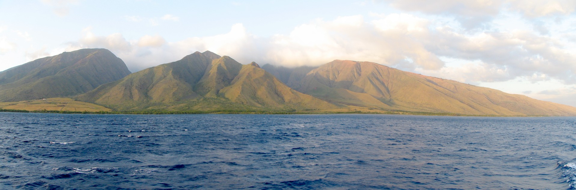 Maui, Hawaii. Beschreibung: Mauii vom Wasser aus fotografiert (Westküste) Quelle: selbst fotografiert Datum: April 2005 Fotograf / Zeichner: Patrick Huebgen